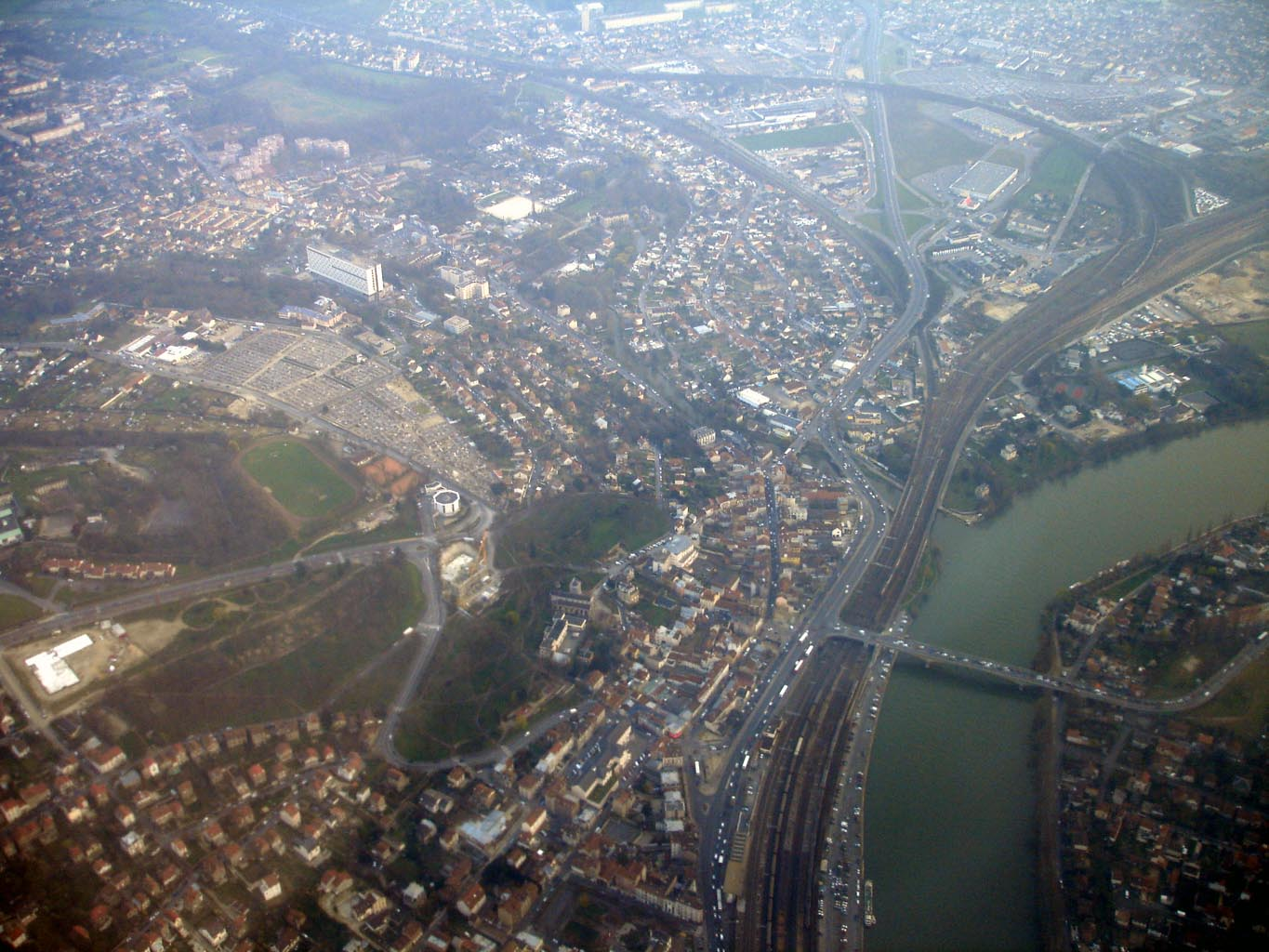 Vue aérienne de Villeneuve-Saint-Georges (Val-de-Marne)